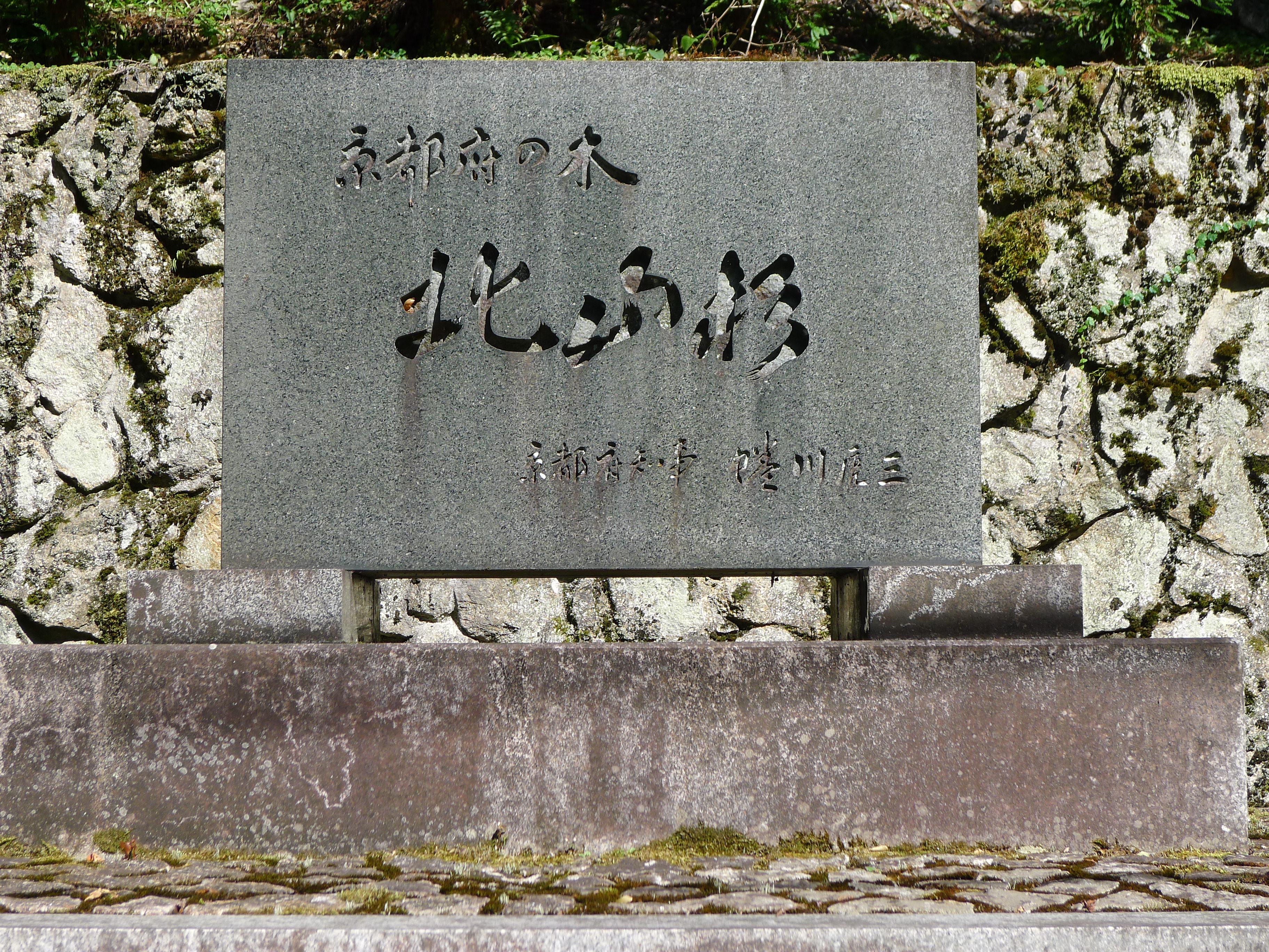 京都市北区北山「杉の里」中川地区にある北山杉の碑